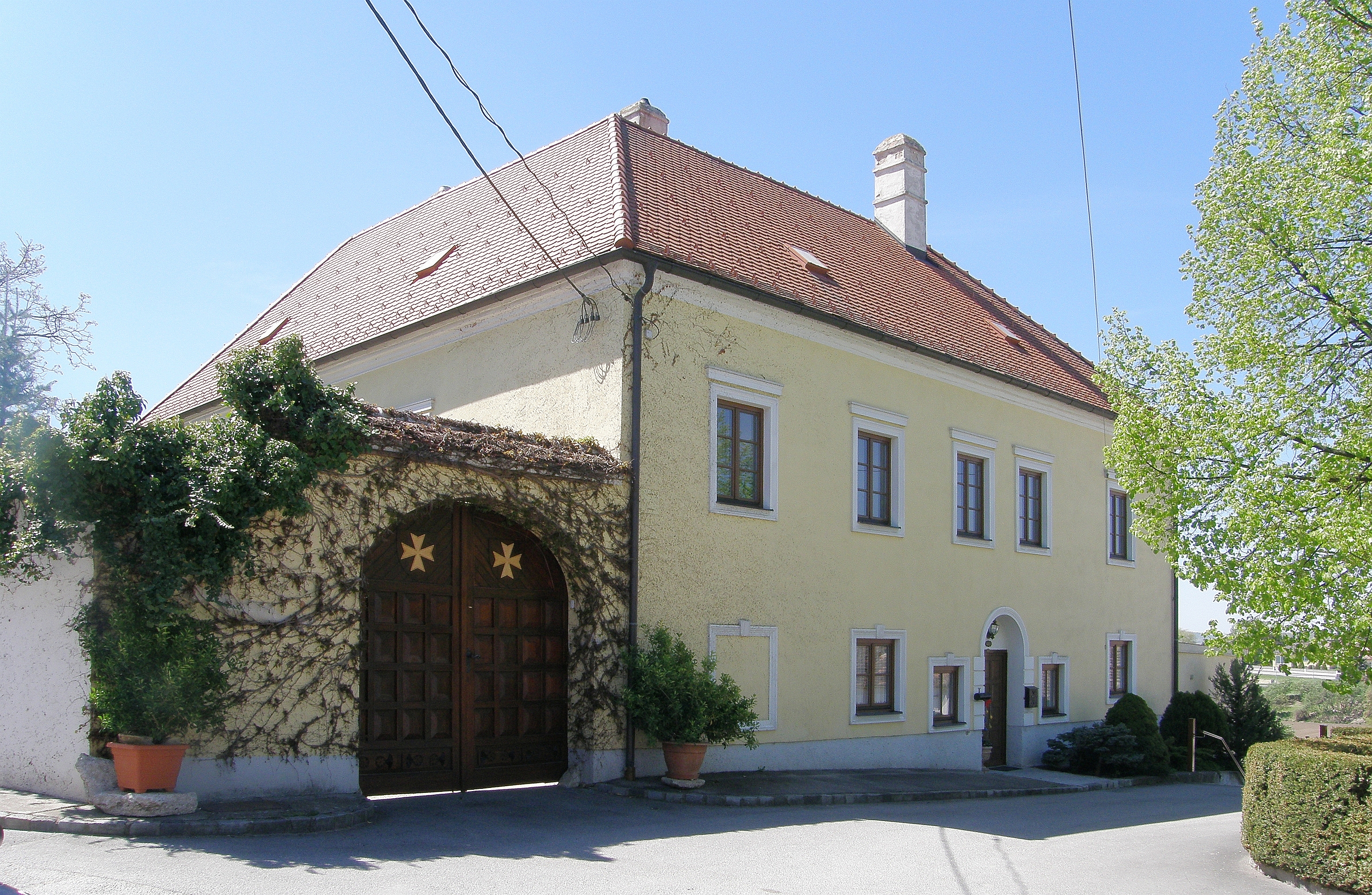 Pfarrhof